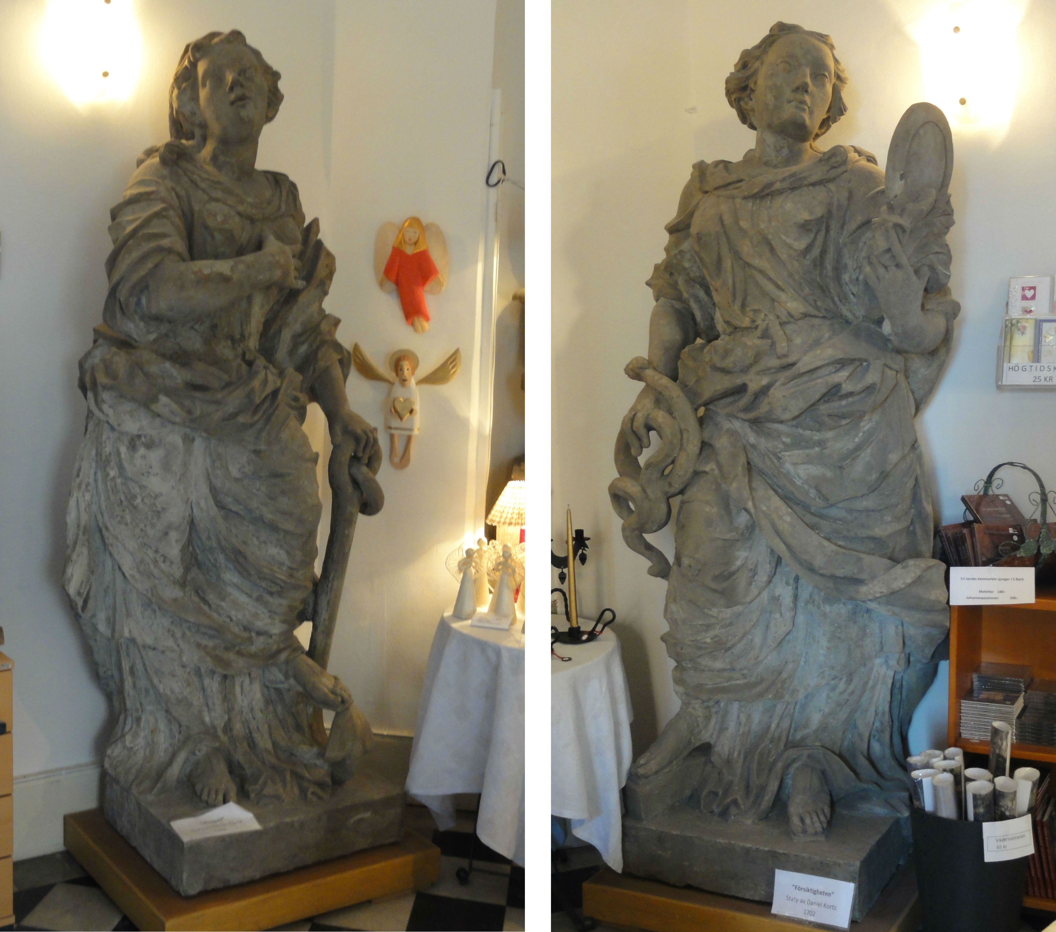 Hoppet och Försiktigheten Material: Sandsten Konstnär: Daniel Kortz År: 1702 Urprunglig placering på grindstolparna in till Storkyrkogården från Källargränd. Efter renovering mitten på 2000-talet placerade inuti Storkyrkans biljett- och souveniraffär Storkyrkoboden.